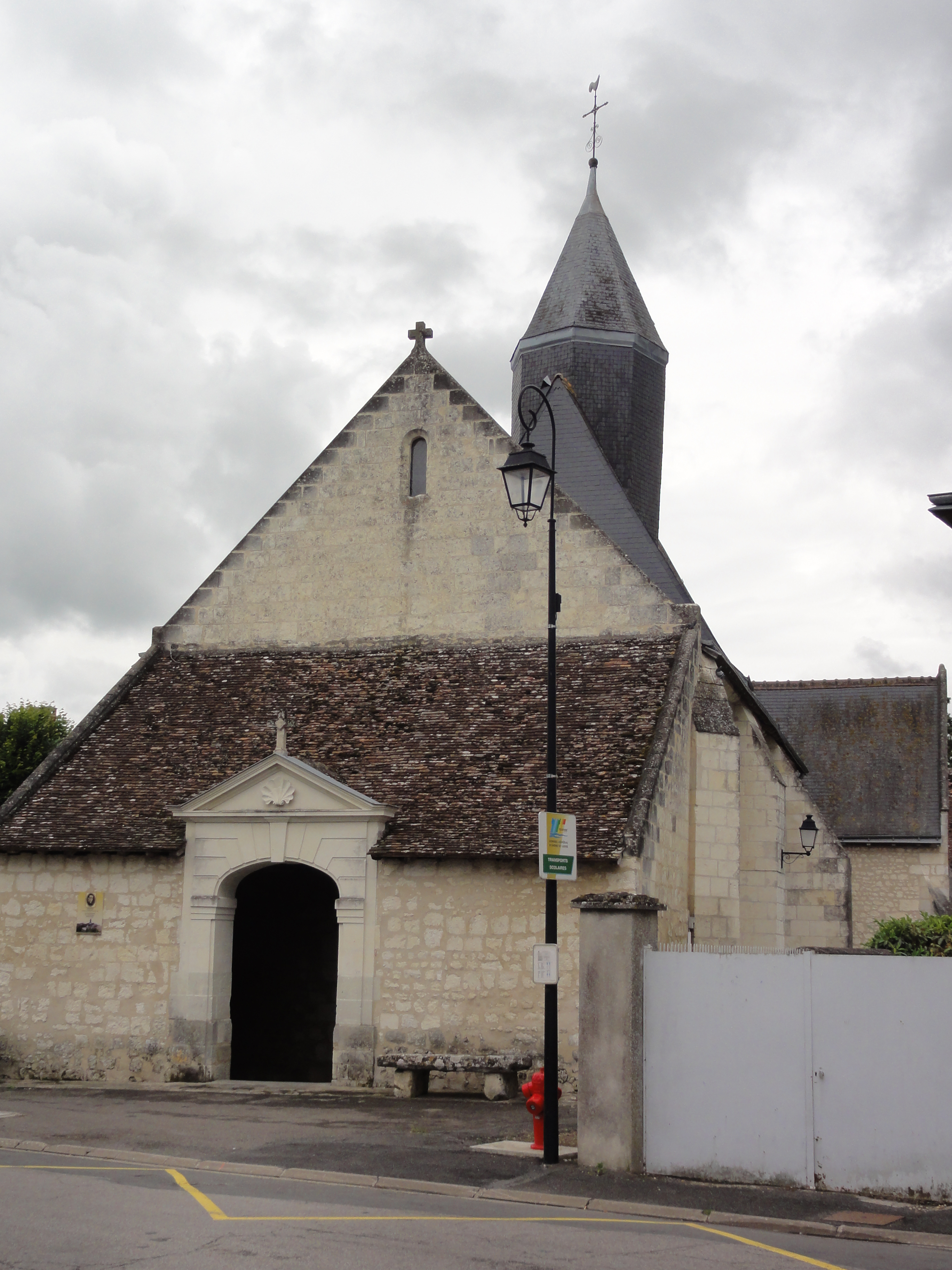 Draché (Indre-et-Loire) Église